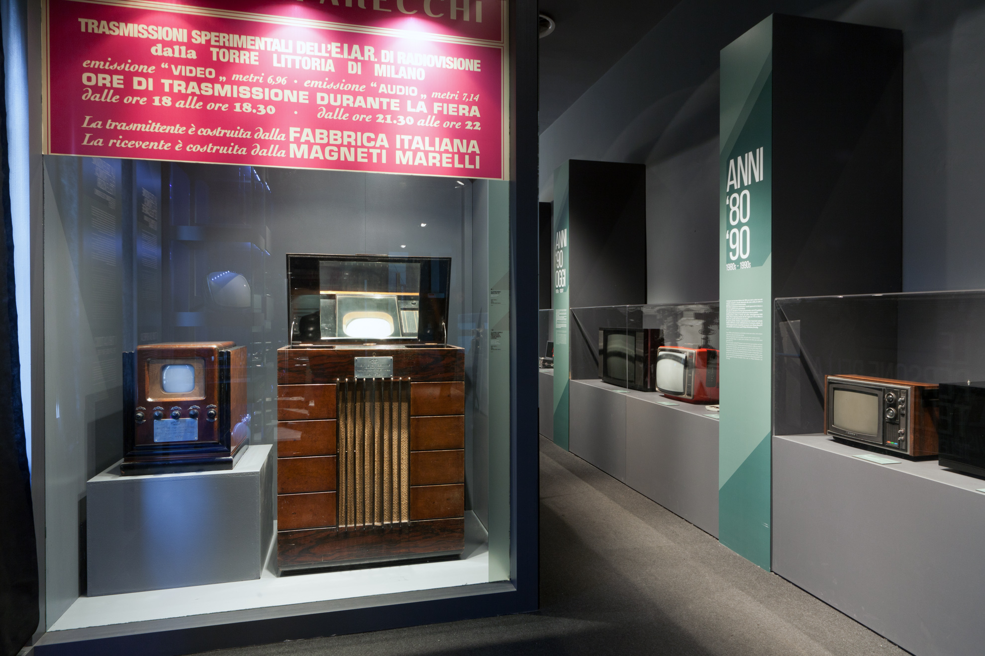 Televisori Magneti Marelli esposti al Museo della scienza e della tecnologia Leonardo da Vinci di Milano.